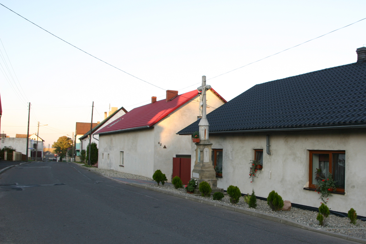 Ucieszków – wieś w Polsce położona w województwie opolskim, w powiecie kędzierzyńsko-kozielskim, w gminie Pawłowiczki.